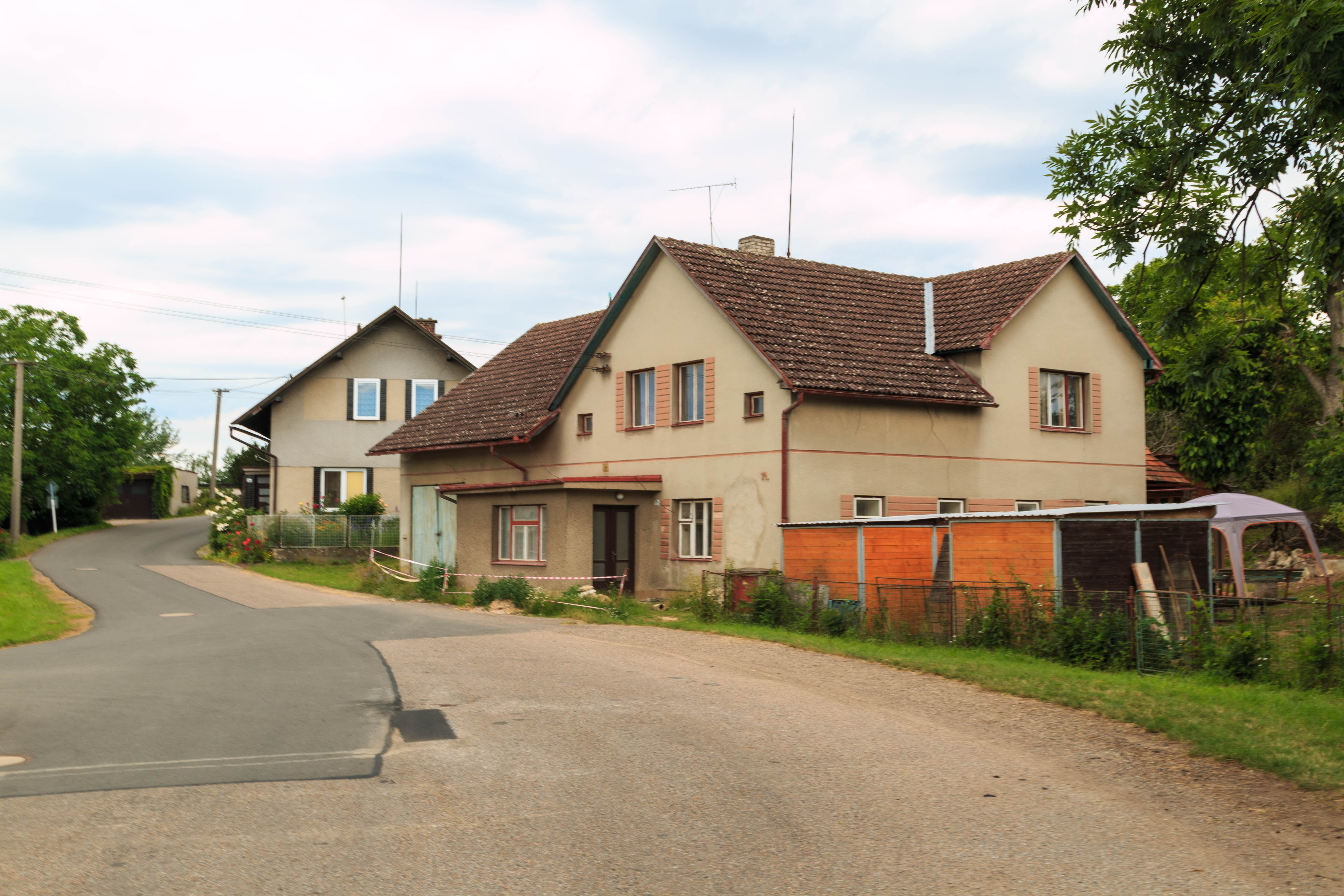 Hradiště čp. 71